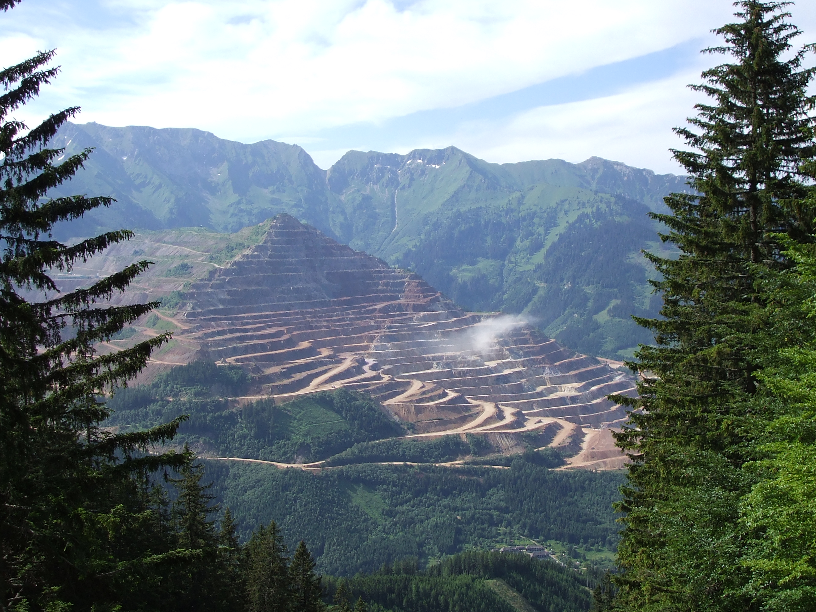 Erzberg seen from Pfaffenstein